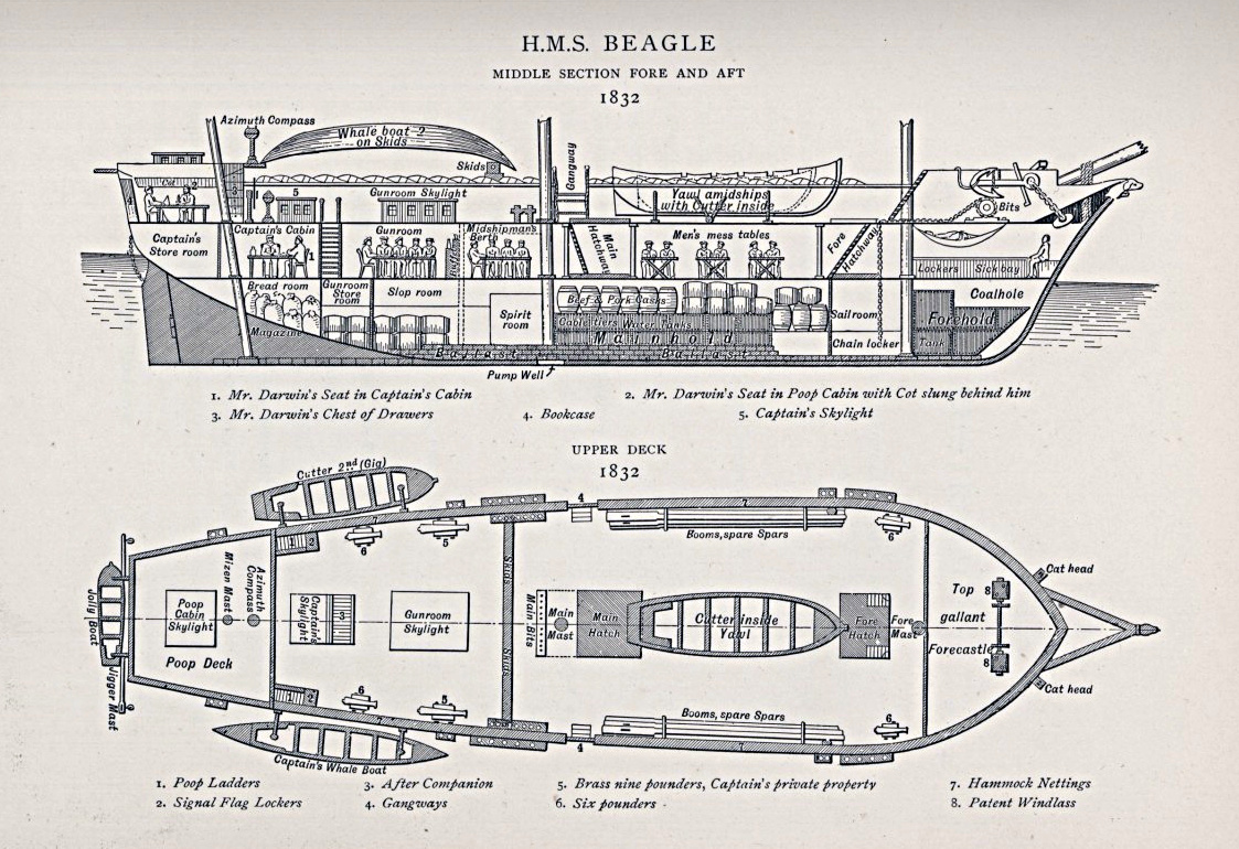 Plans de l'HMS Beagle: Middle section fore and aft, upper deck, 1832. Image provenant de : A Naturalist's Voyage Round the World, Journal of Researches into the Natural History and Geology of the countries visited during the voyage round the world of H.M.S. Beagle under the command of Captain Fitz Roy, R.N., By Charles Darwin, M.A., F.R.S., with illustrations by R. T. Pritchett of places visited and objects described.